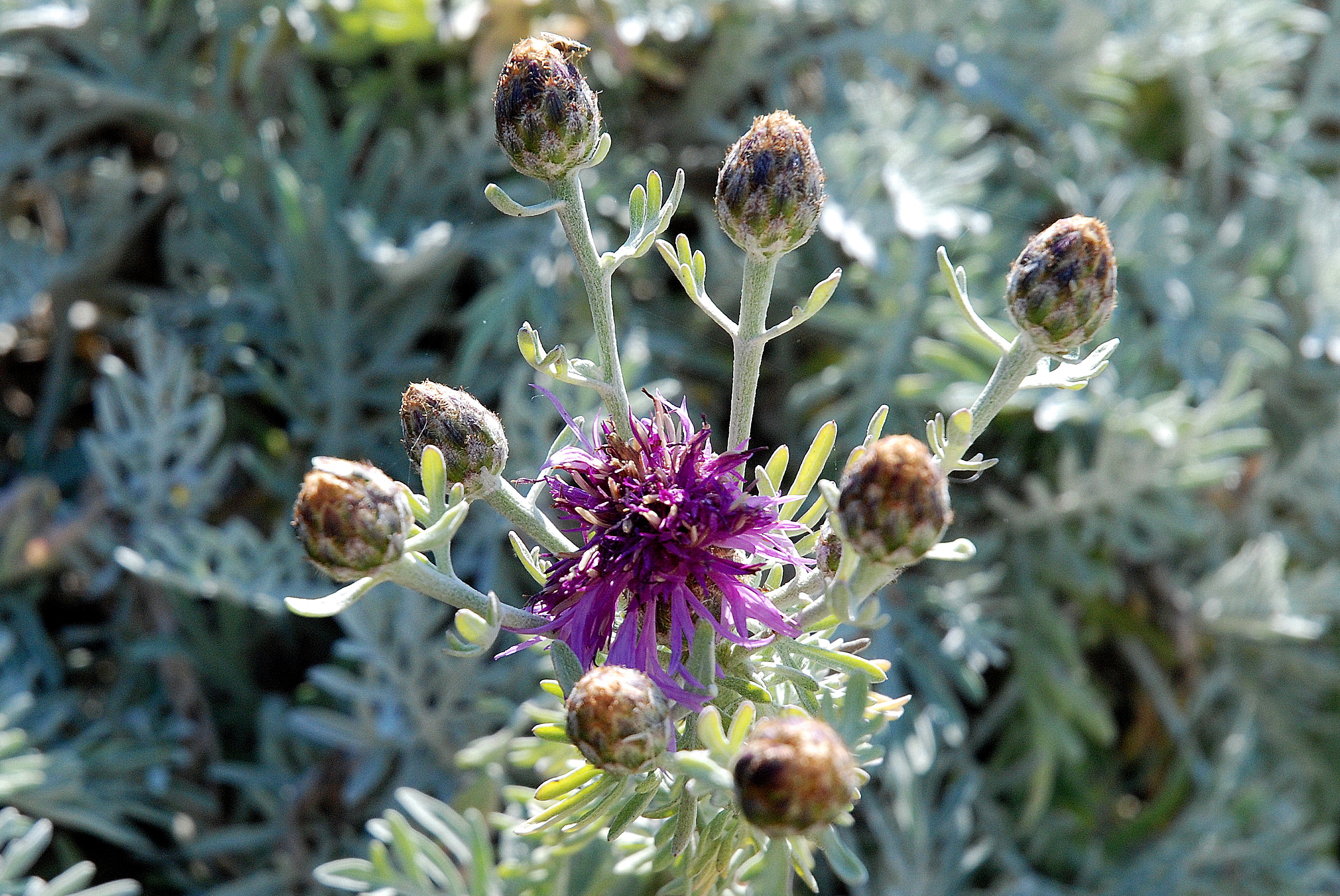 Psephellus pulcherrimus